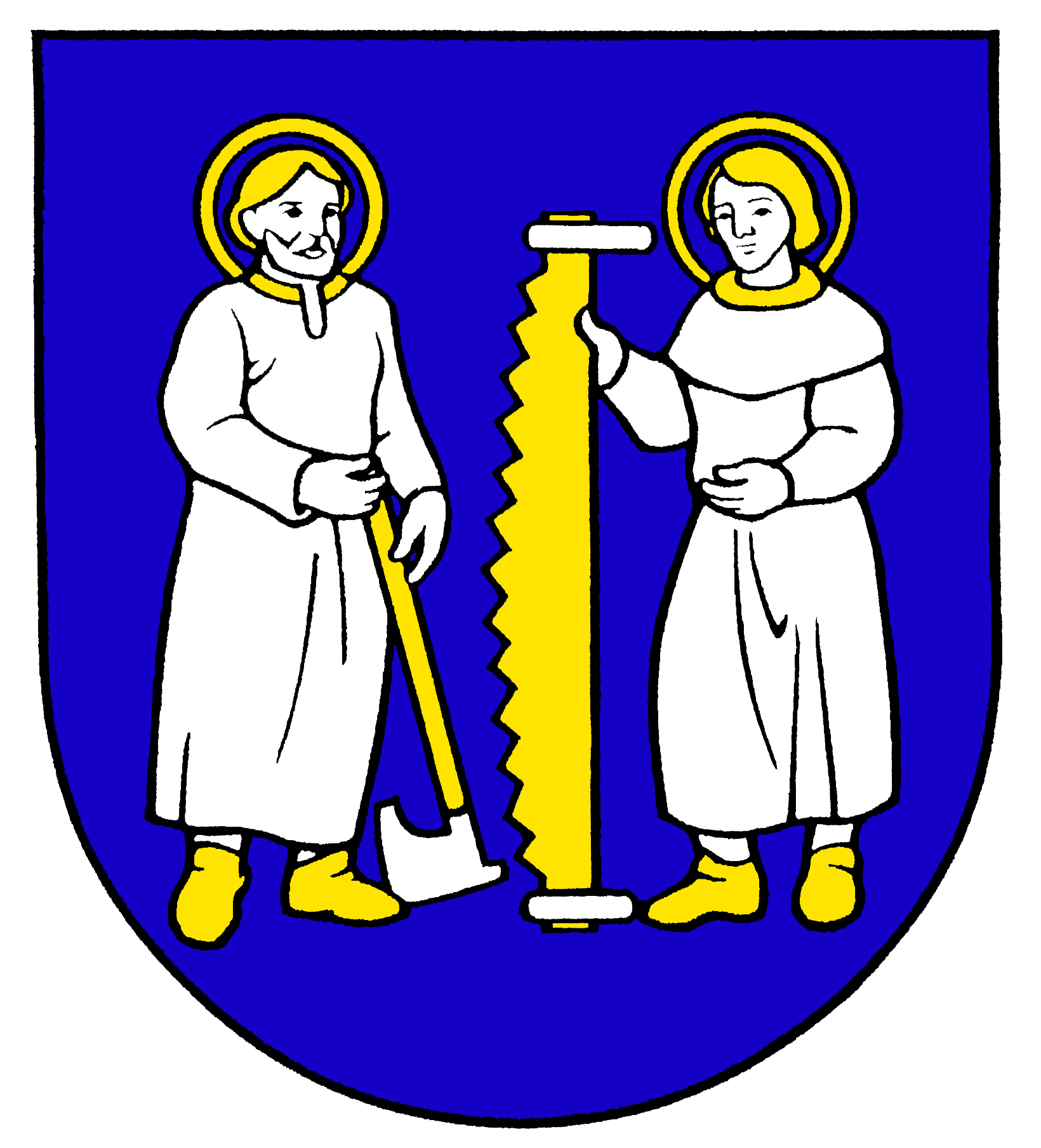 Erb obce Liptovská Porúbka.